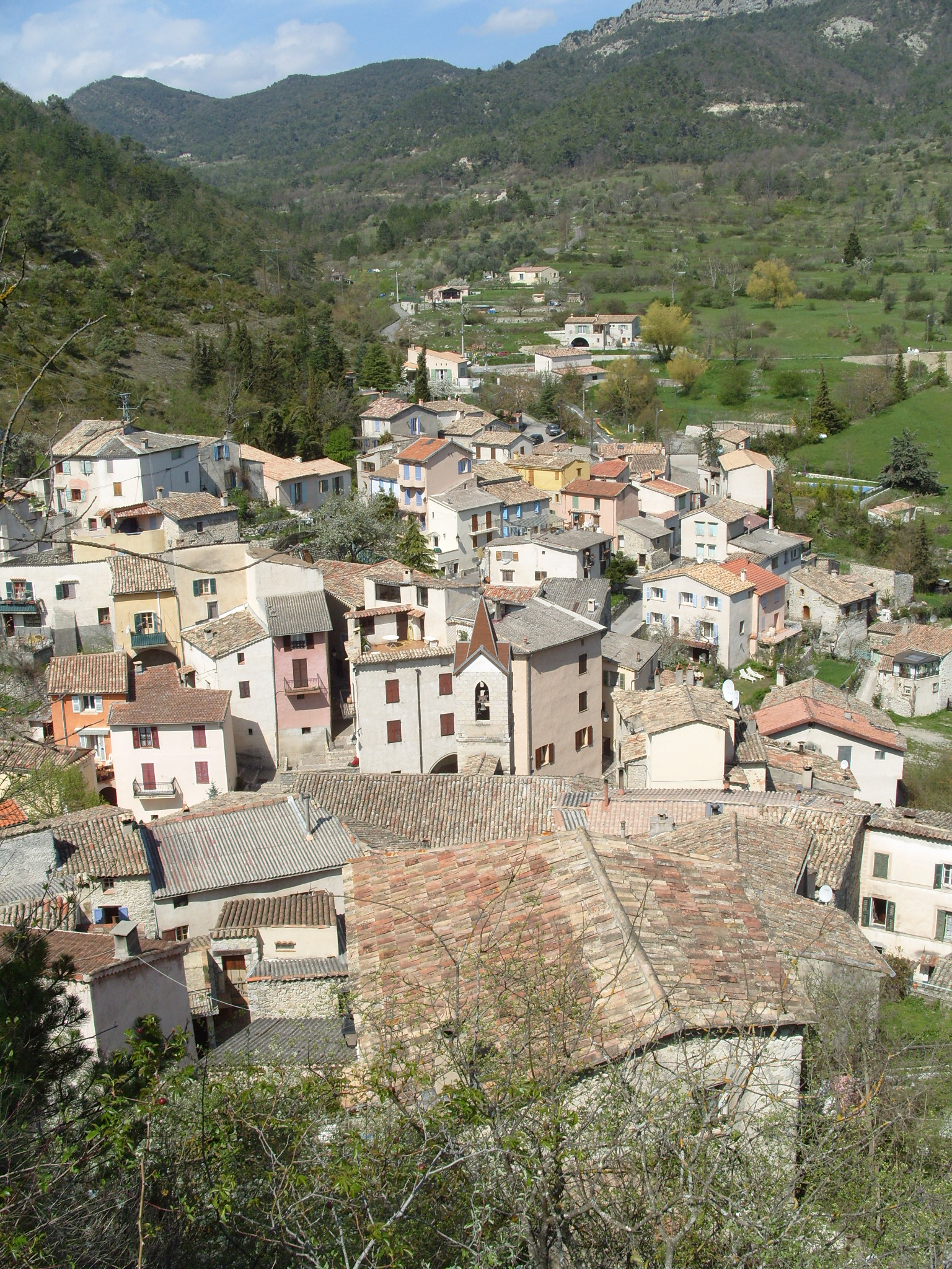 Le village de Cuébris (Alpes-Maritimes), vue prise du piton anciennement fortifié au Sud. Au loin, montagne de Sauma Longa et route vers le lieu-dit La Morge.